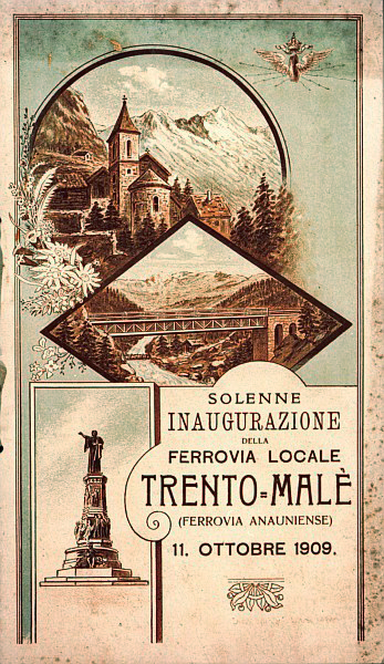 Solenne inaugurazione della Ferrovia locale Trento-Malè (Ferrovia Anauniense), 11 ottobre 1909.